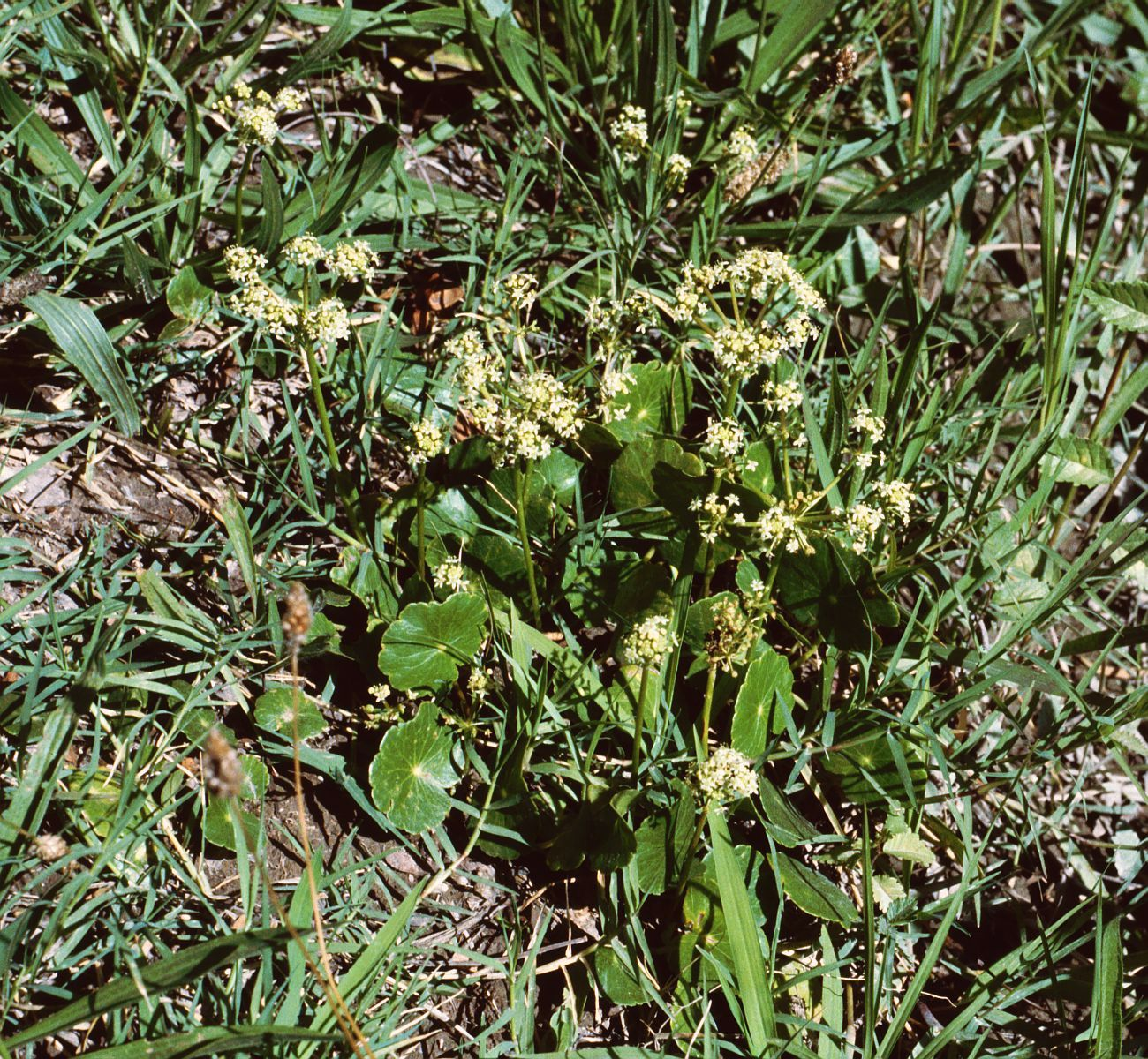 Hydrocotyle bonariensis, Efeugewächse (Araliaceae) - Argentinien/Argentina, Mendoza, Parque General San Martín (Prov. Mendoza)